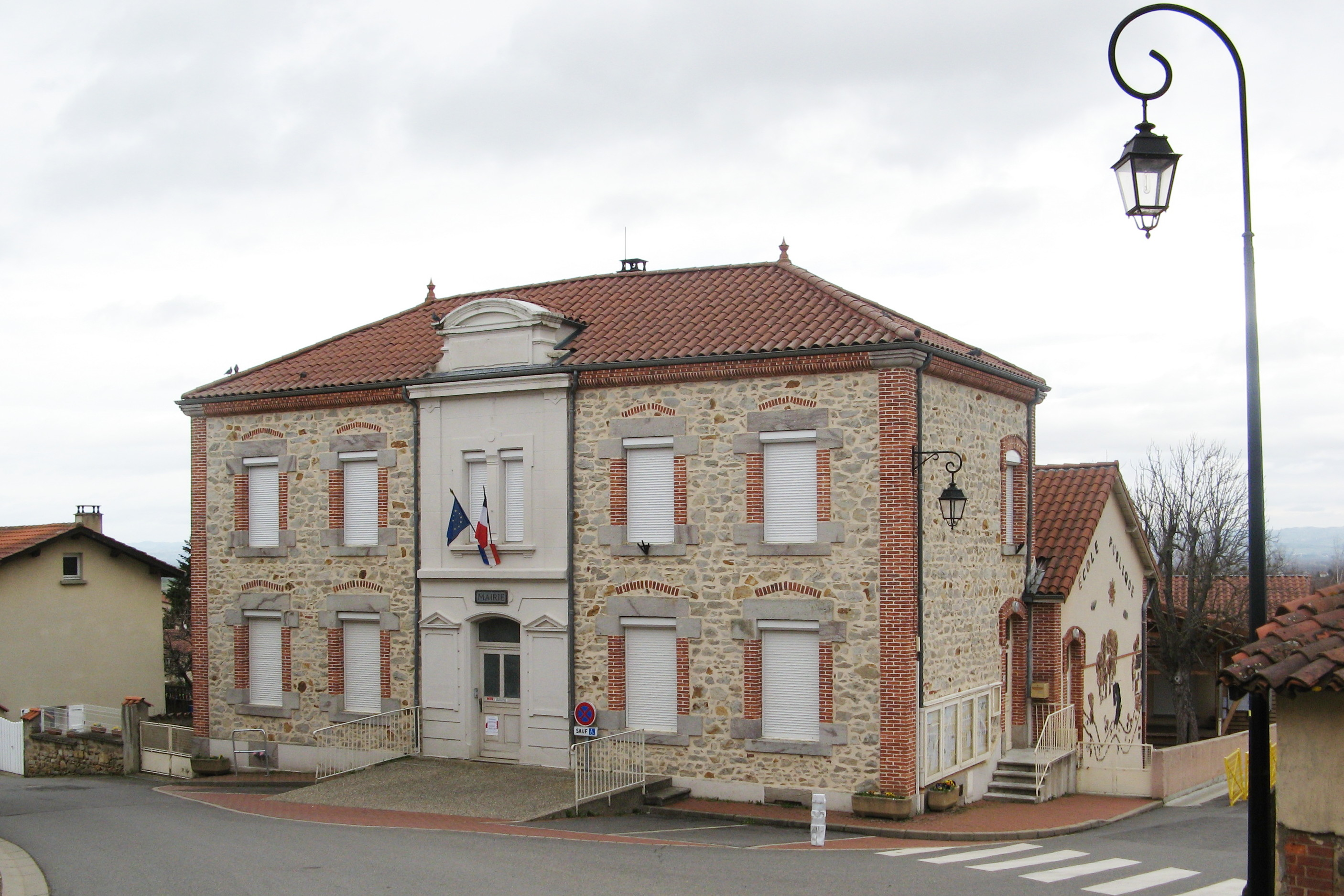 Saint-Thomas-la-Garde : la mairie